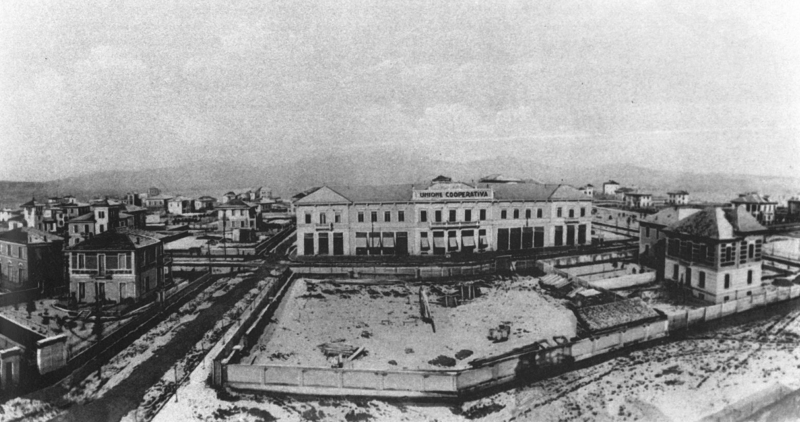 Veduta di Milanino